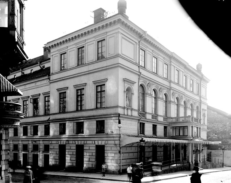 Svenska Teatern, Blasieholmsgatan 4 A i hörnet av Teatergatan